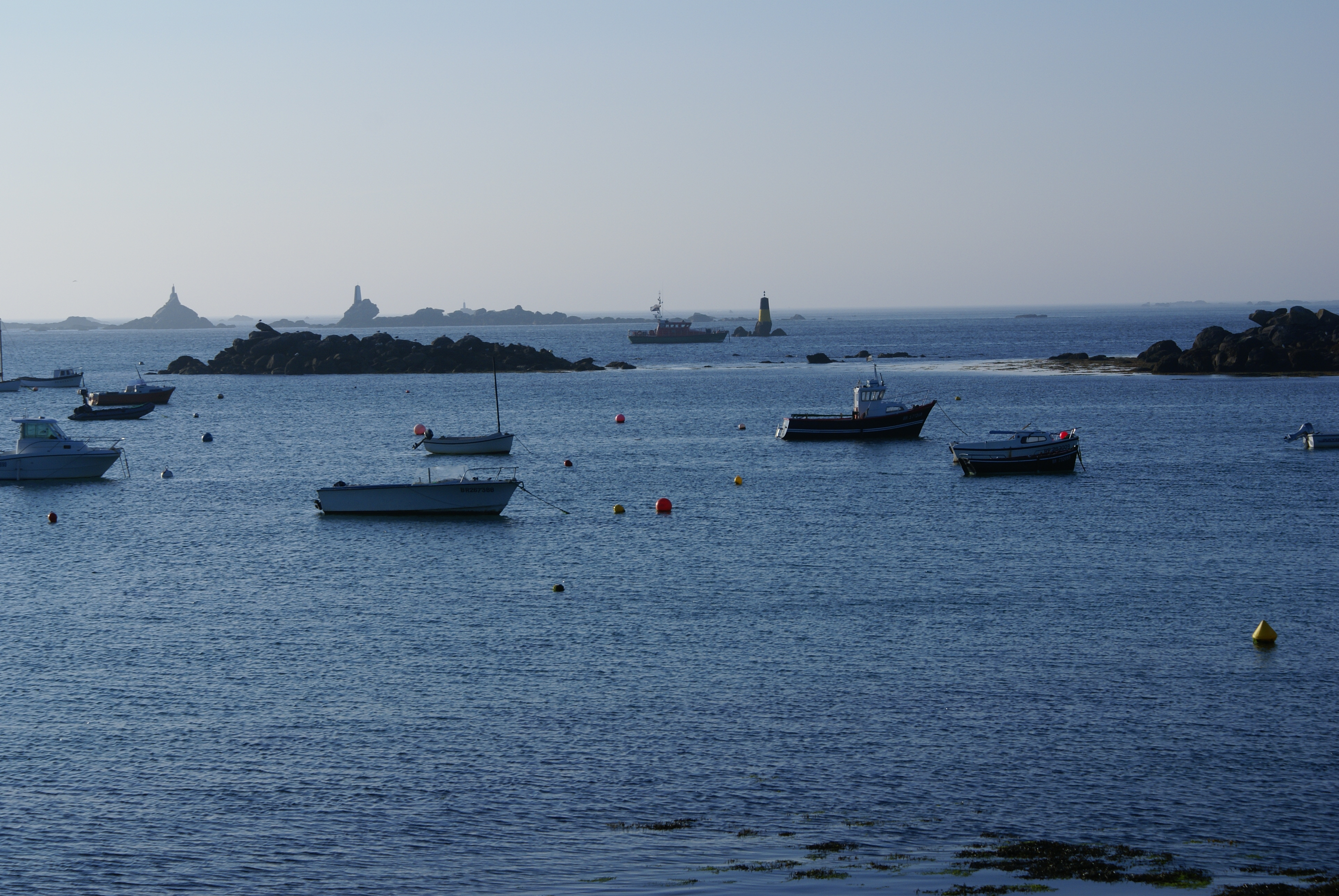 La cote vue de Portsall.